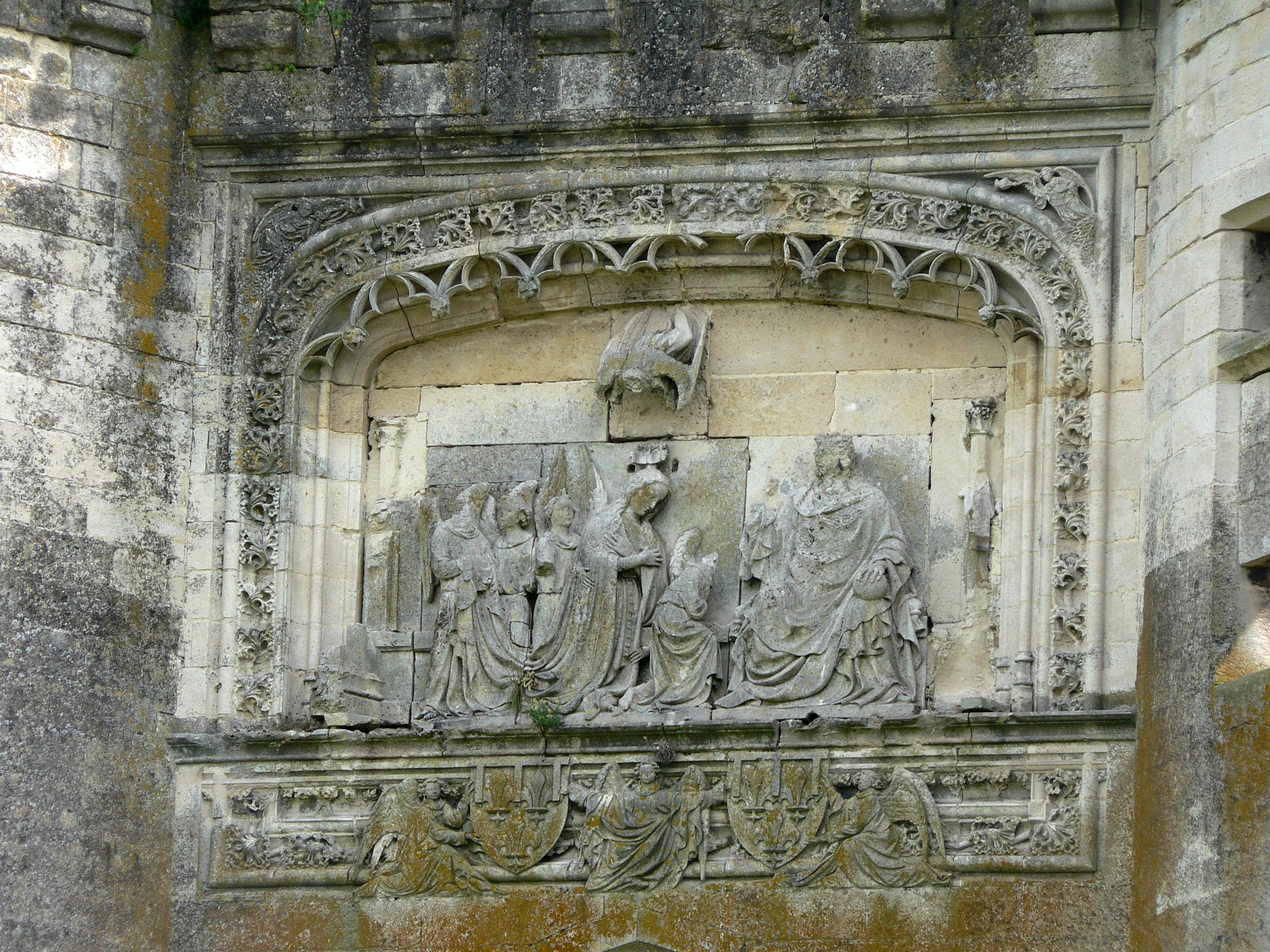 Le couronnement de la Vierge, fronton du Château de La Ferté-Milon, Aisne, France